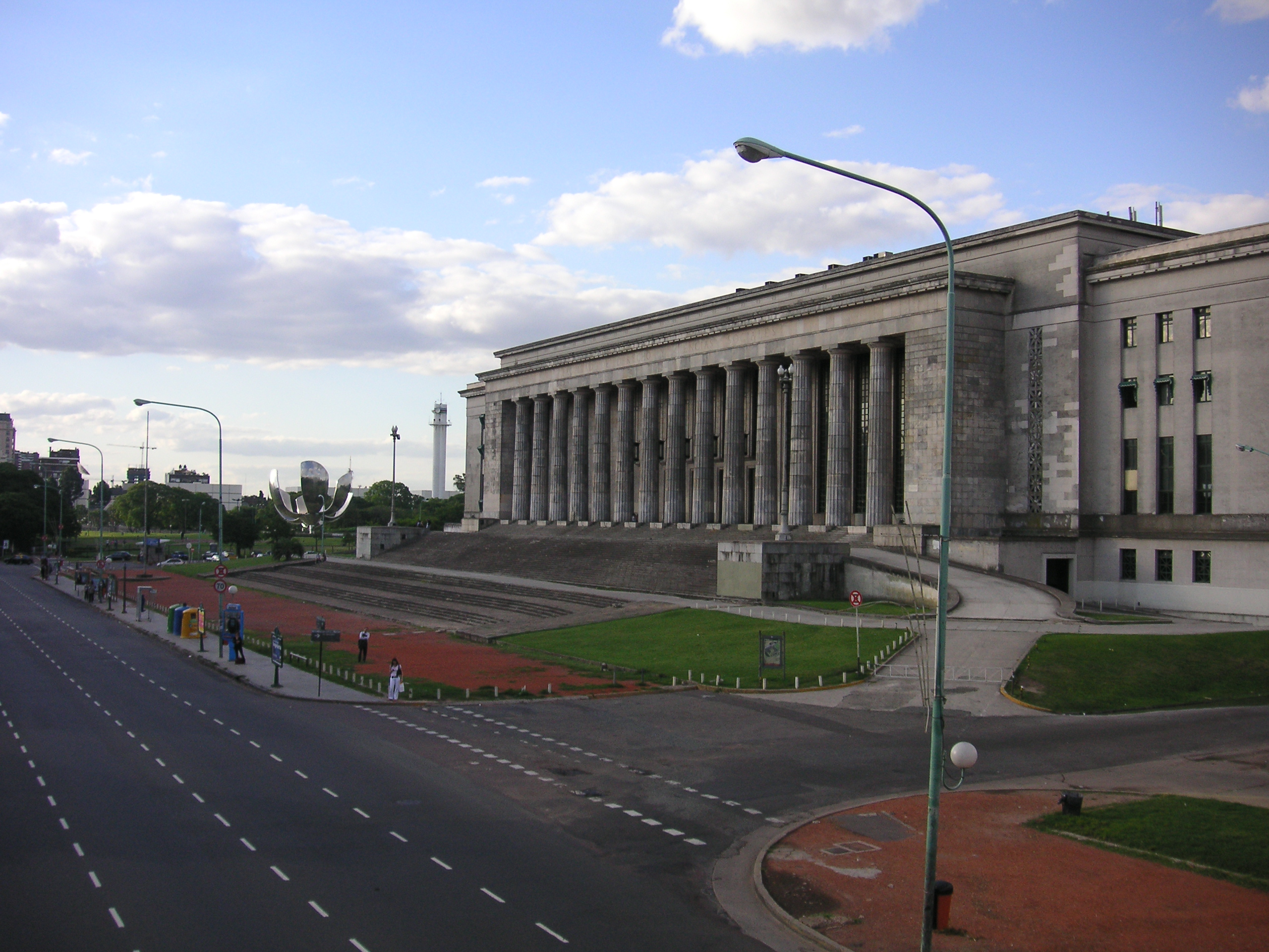 Floralis generica es una escultura metálica situada en la Plaza de las Naciones Unidas de la Ciudad Autónoma de Buenos Aires, obsequiada a dicha ciudad por el arquitecto argentino Eduardo Catalano.